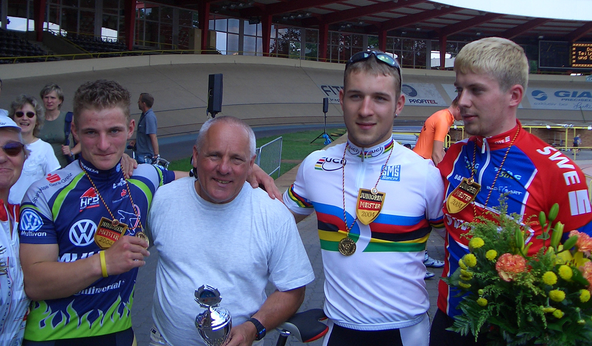 Trainer Jochen Wilhelm aus Erfurt mit Sportlern, v.l.n.r.: René Enders, Robert Förstemann, Alexander Lesser